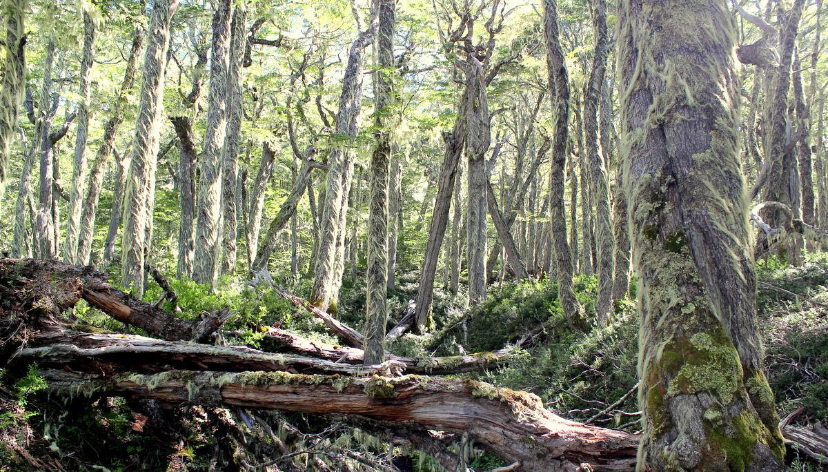 Bosque en la Reserva Nacional Coyhaique.